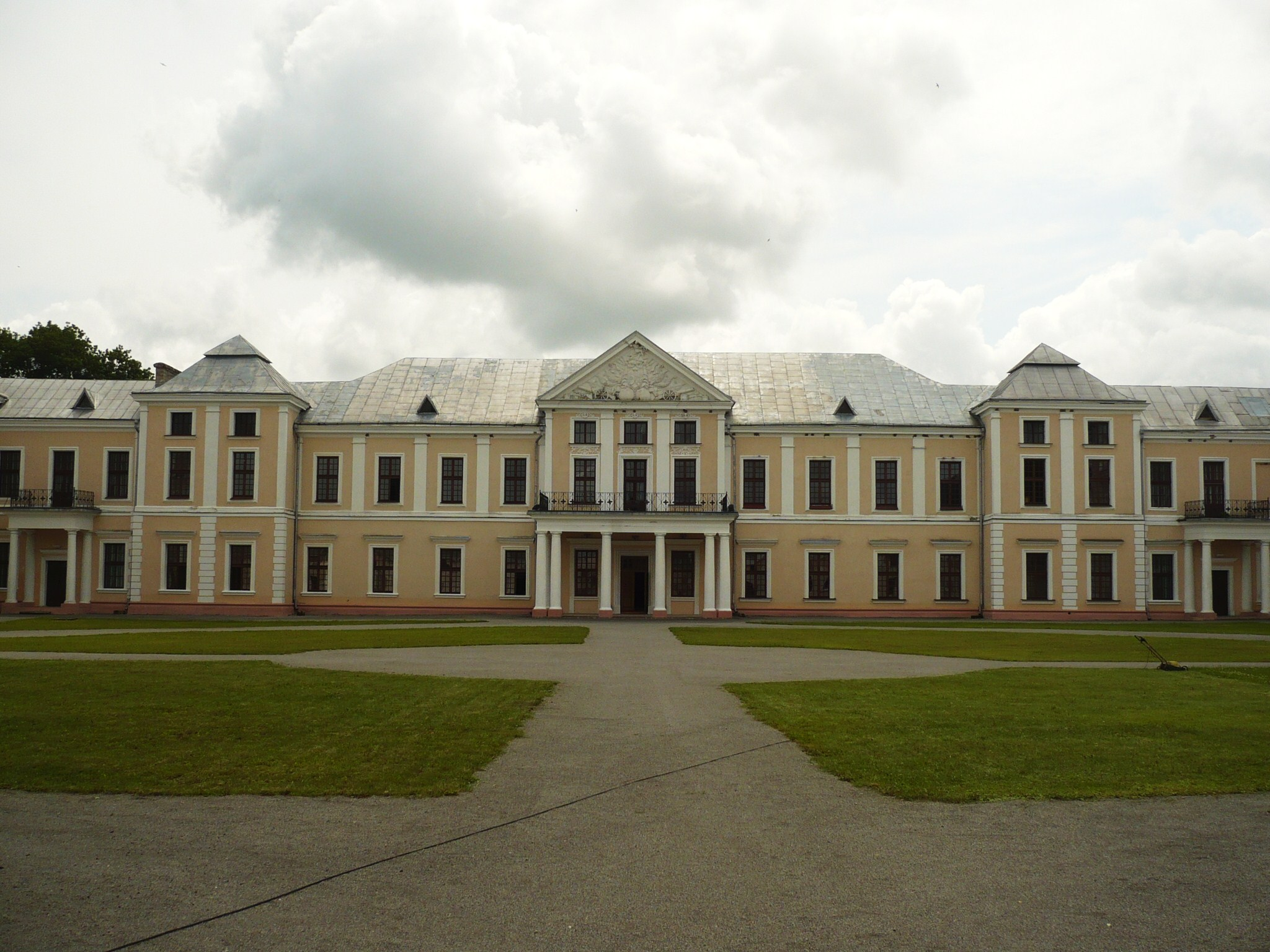 Wiśniowiec, pałac